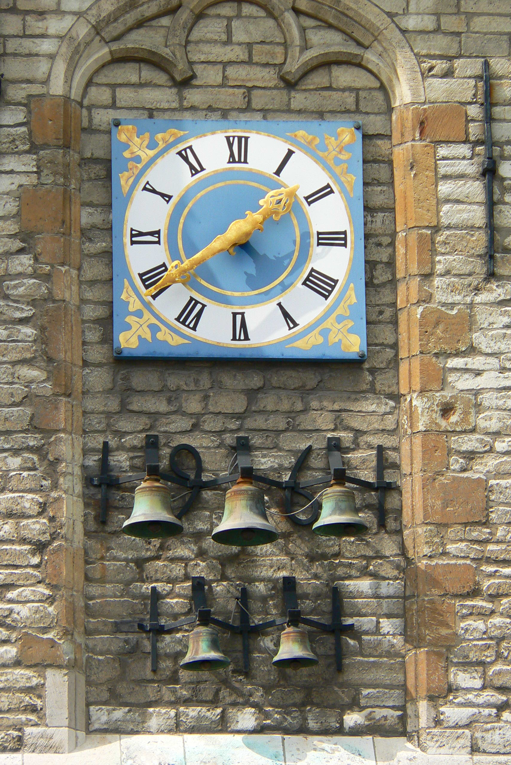 Uhr und Glockenspiel an der Ostseite (Südöstliche Ecke) am Rathaus von Gouda, Niederlande